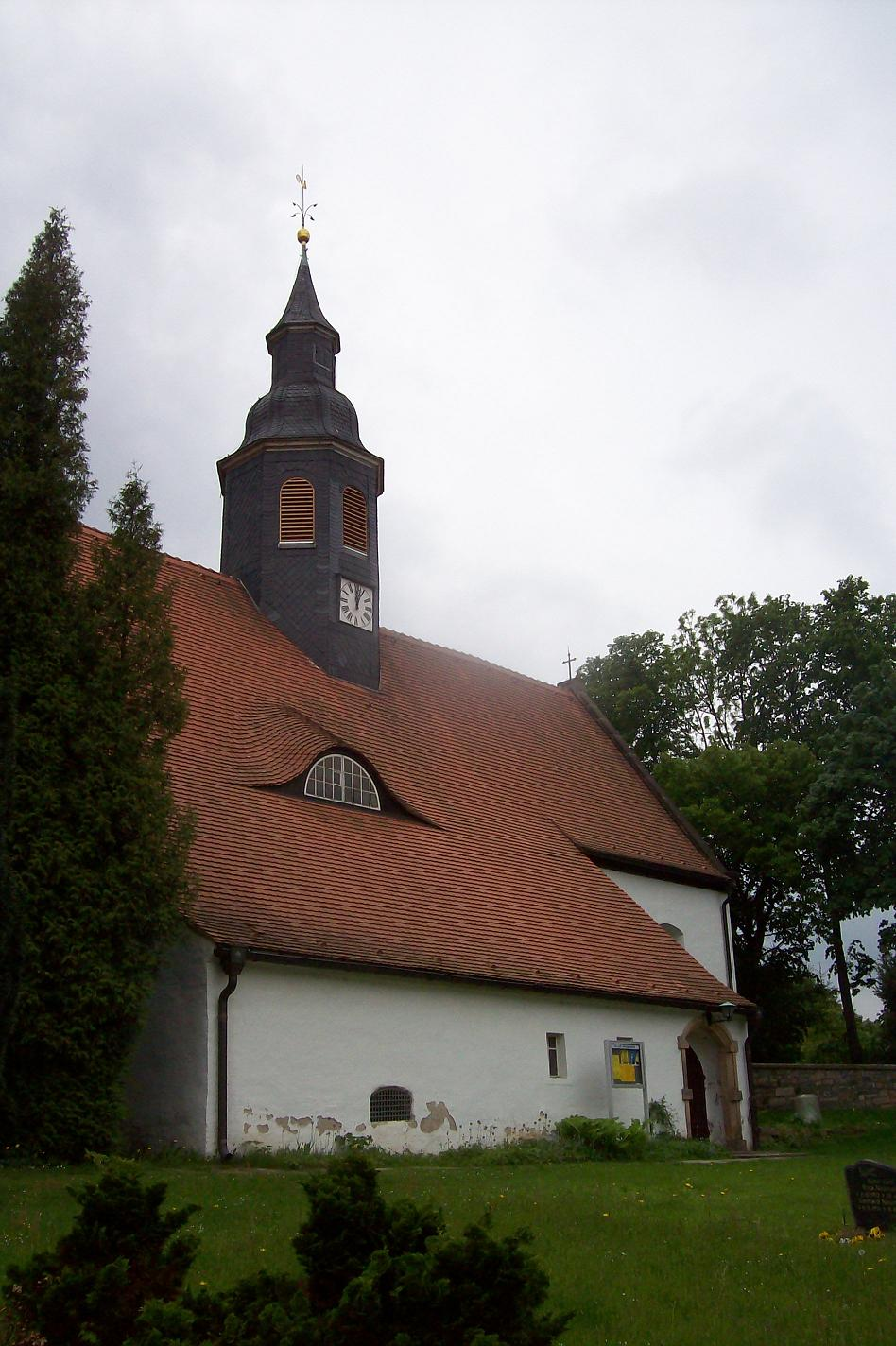 Kirche Fördergersdorf, Nordansicht